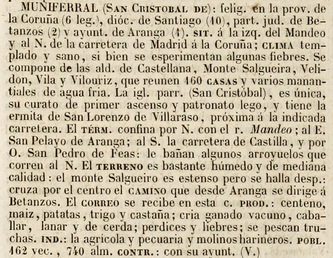 Muniferral no Diccionario geográfico-estadístico-histórico de España y sus posesiones de Ultramar.